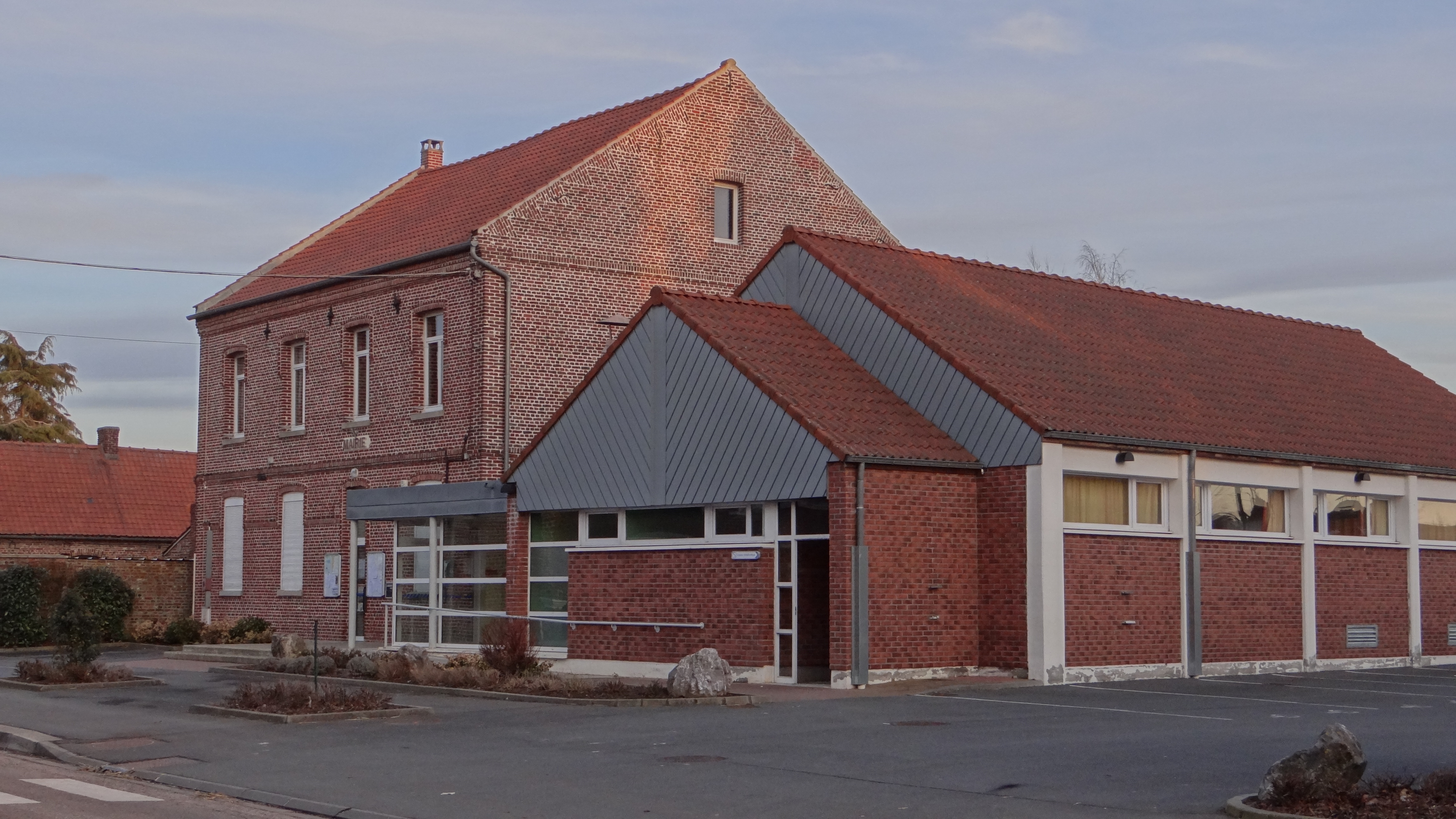 Wasnes-au-bac - la mairie